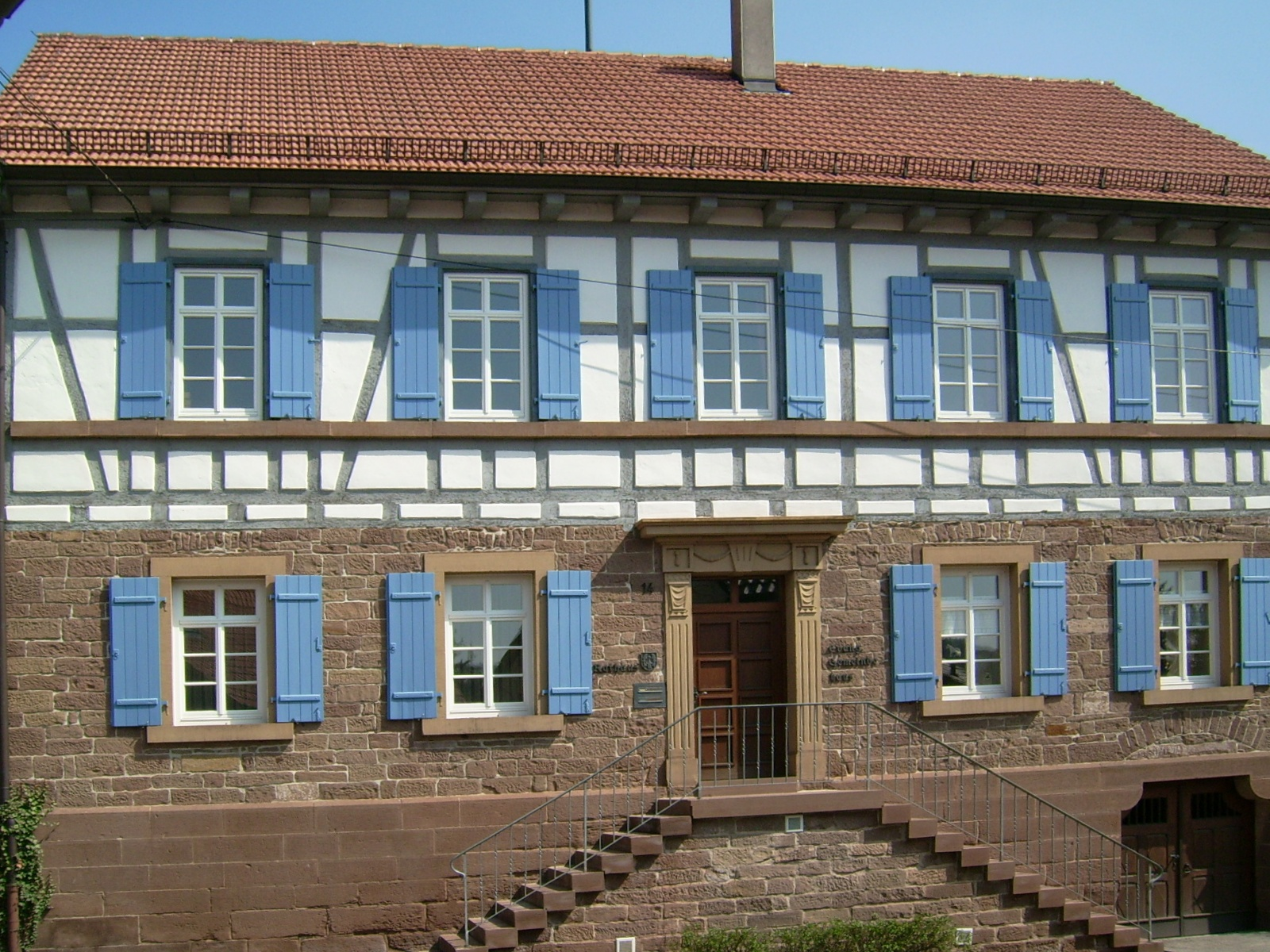 Zaisersweiher Germany Rathaus